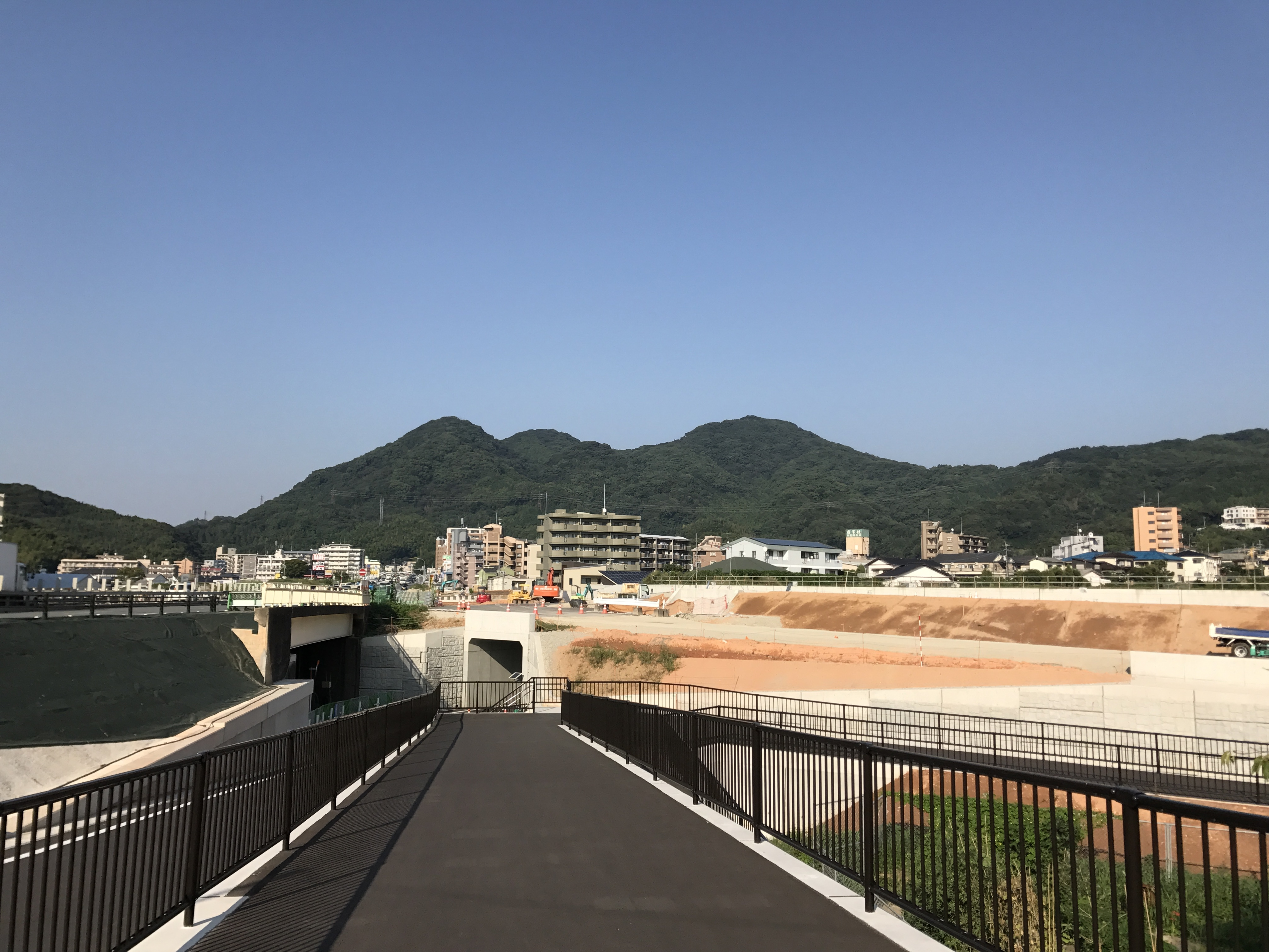 福岡市東区松香台より望む立花山